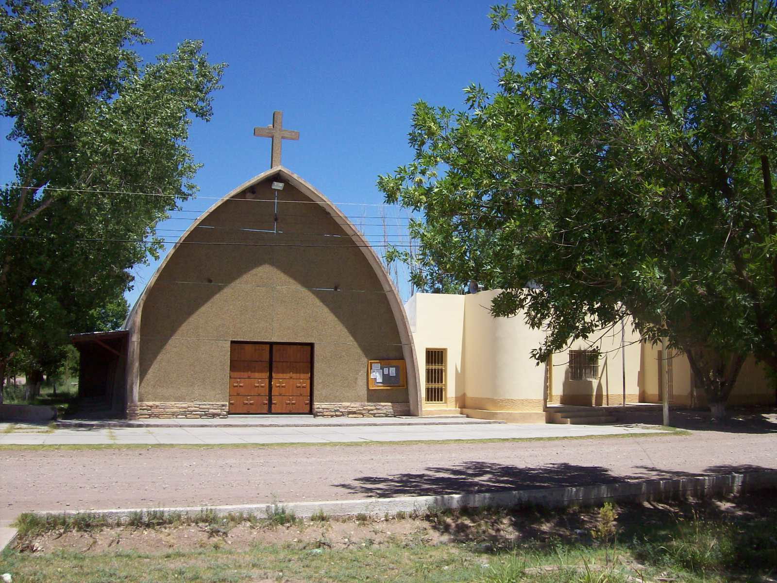 Frente de la Iglesia Parroquial San Francisco de Asis en Real del Padre